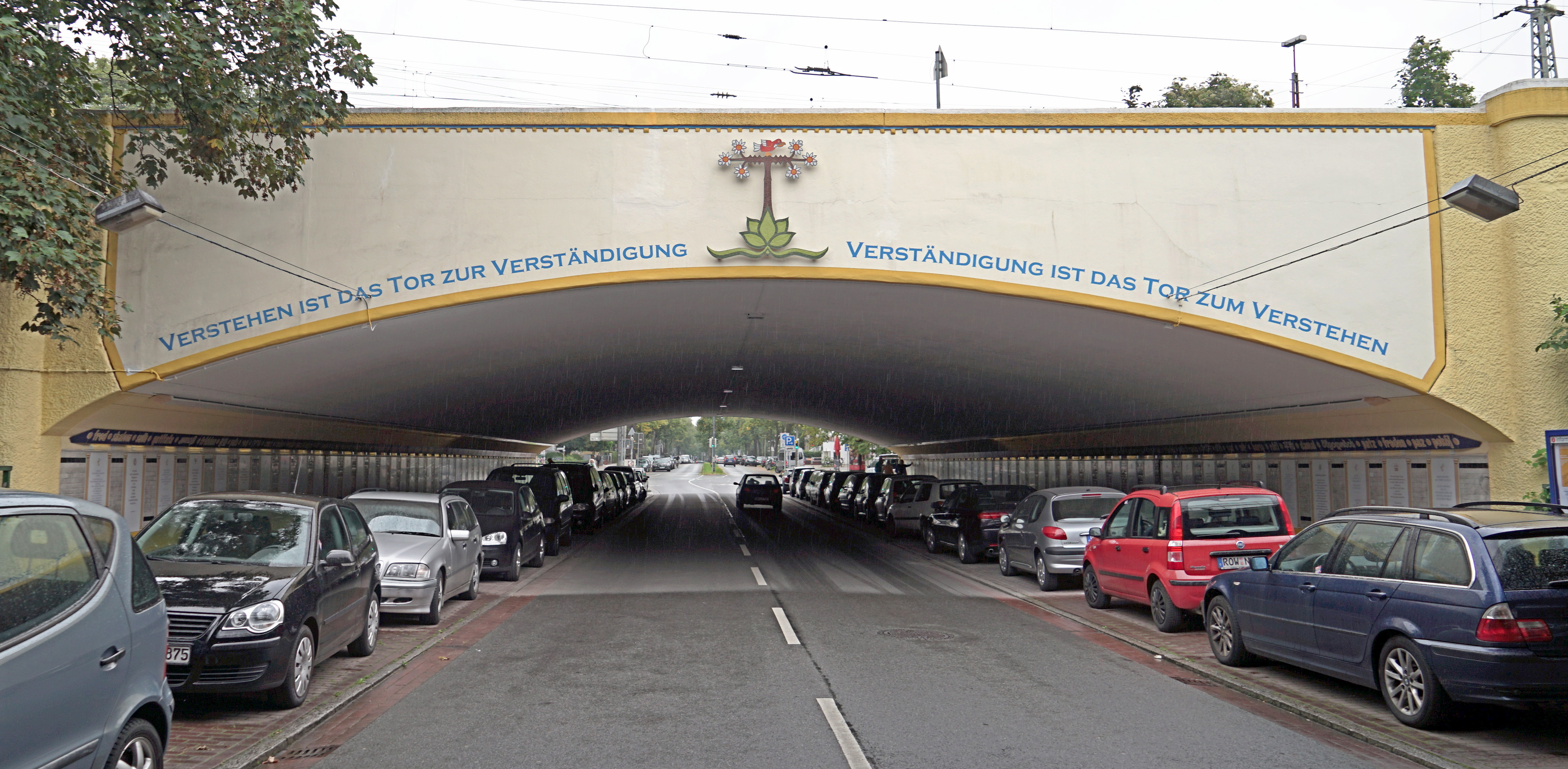 Friedenstunnel in Bremen. Der Rembertitunnel ist beidseitig auf rund 100 m mit Mosaiken und Texttafeln bestückt. Die Mosaiken stellen in 135 Sprachen das Wort „Frieden“ dar.